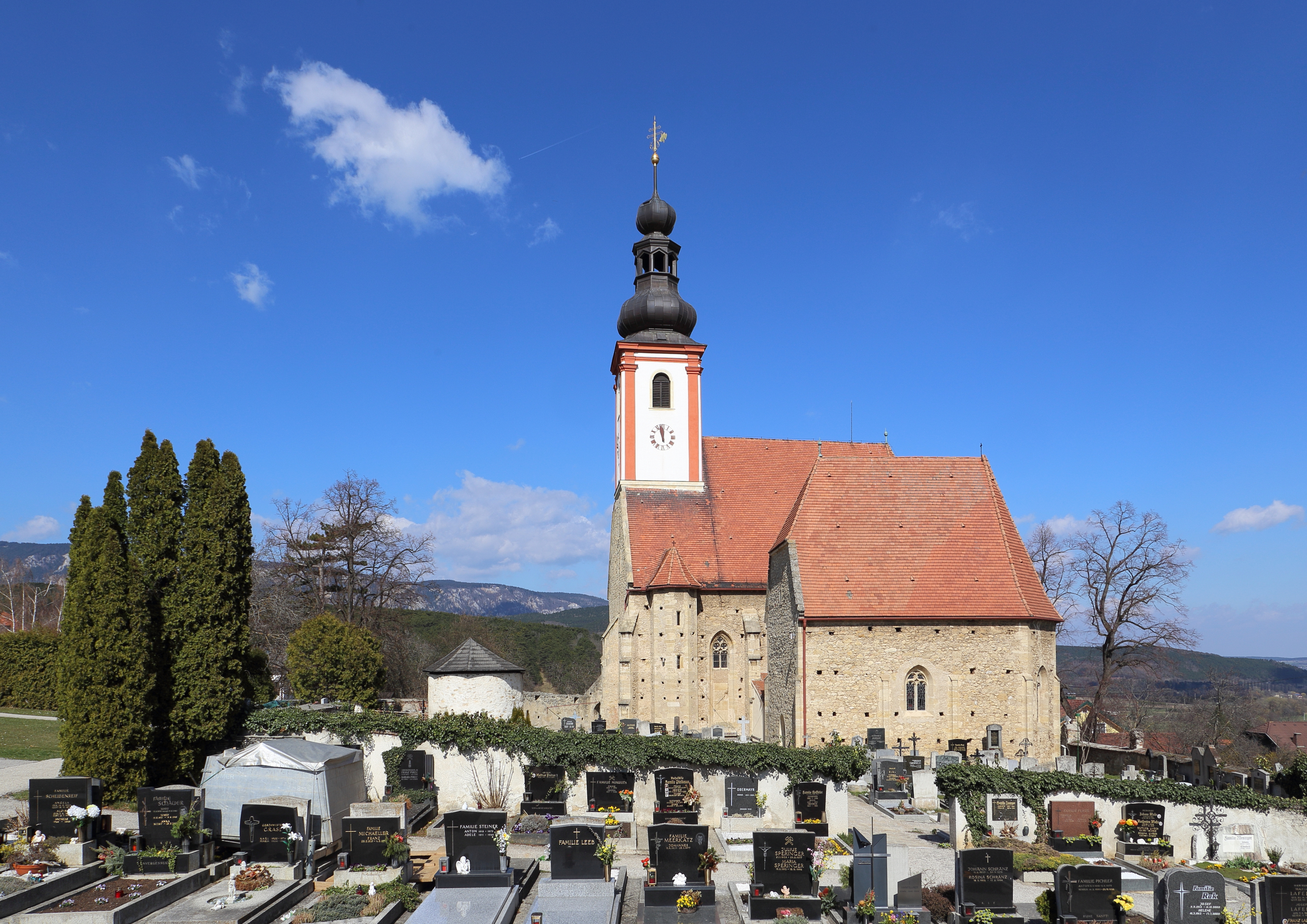 Südwestansicht der Pfarrkirche hl. Anna und der Herz-Jesu-Kapelle (Sebastianskapelle) in der niederösterreichischen Gemeinde Würflach. Die Pfarrkirche ist eine spätgotische Wehrkirche, die zum Teil barockisiert wurde. Im Zuge der Türkenbelagerung wurde sie schwer beschädigt und ab 1685 wieder aufgebaut; unter anderem erhielt sie 1731/33 einen barocken Turmaufsatz an Stelle des zerstörten. Die Herz-Jesu-Kapelle wurde Ende des 15. Jahrhunderts errichtet und war ursprünglich den Pestpatronen hl. Sebastian und hl. Rochus geweiht. Im 17./18. Jahrhundert wurde die Kapelle dem Verfall preisgegeben, jedoch 1878 bis 1892 wiederinstandgesetzt und als Herz-Jesu-Kapelle neu geweiht.